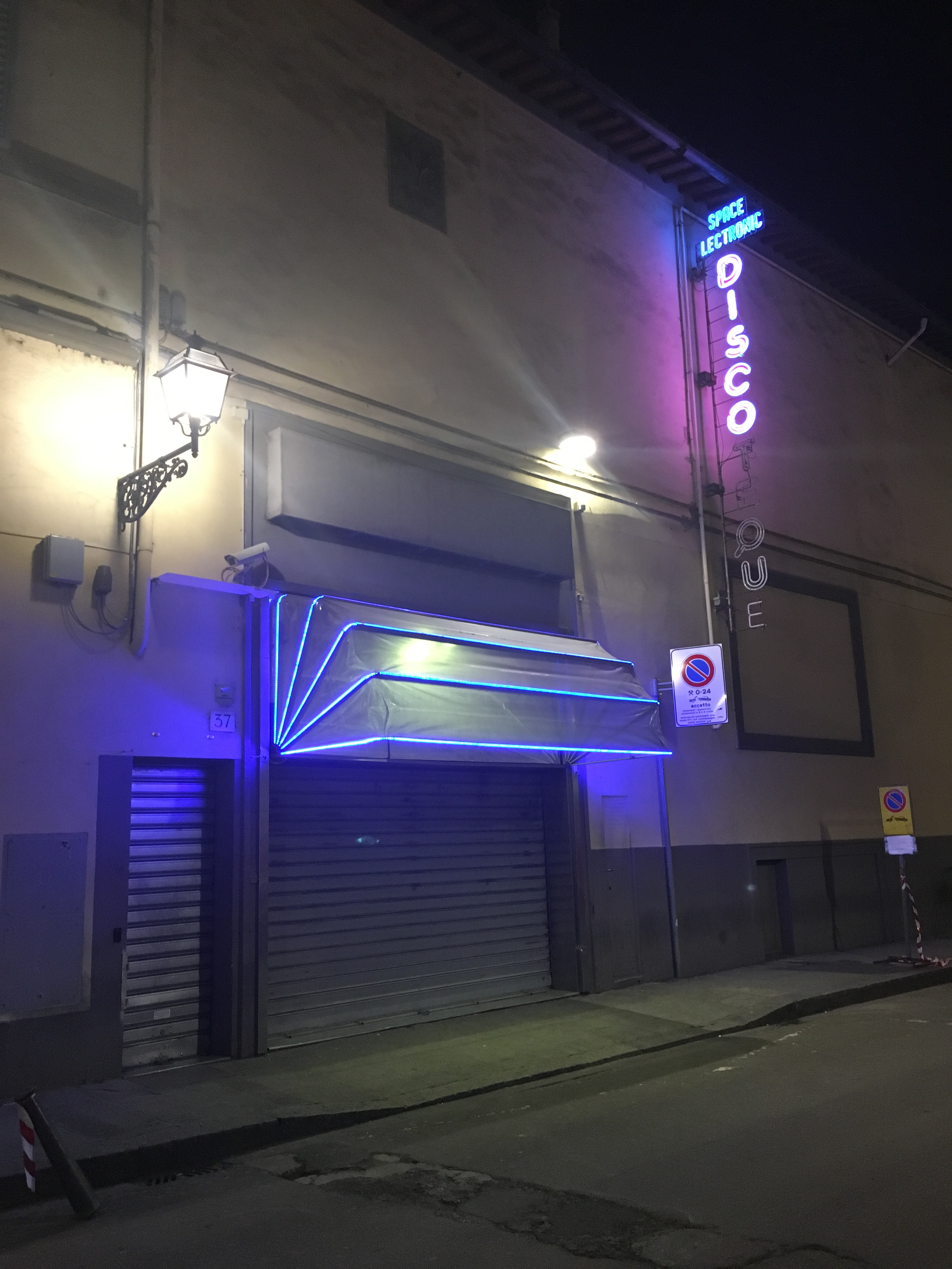 Space Electronic. Discoteca di Firenze